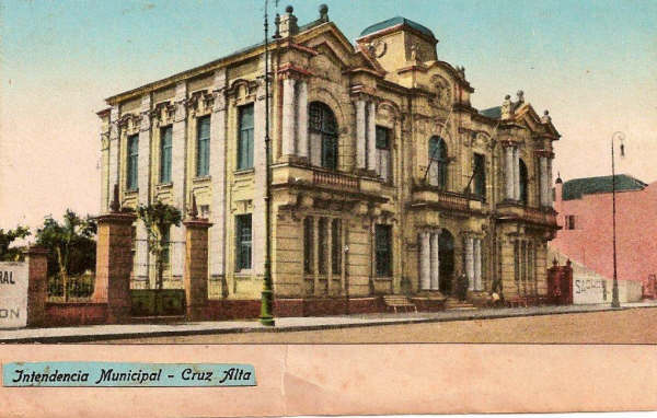 Prefeitura de Cruz Alta entre os anos 1930 e 1950.